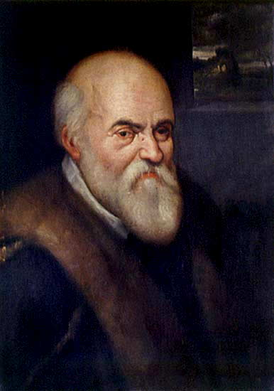 Italian scientist Ulisse Aldrovandi.